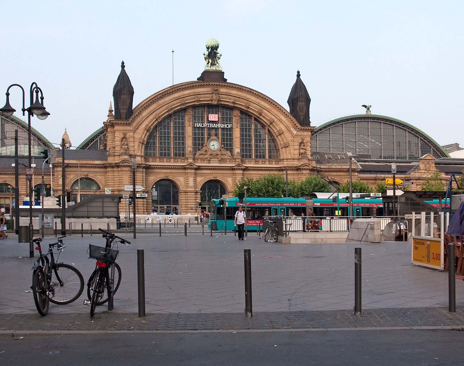 Hauptbahnhof / Frankfurt am Main, Germany